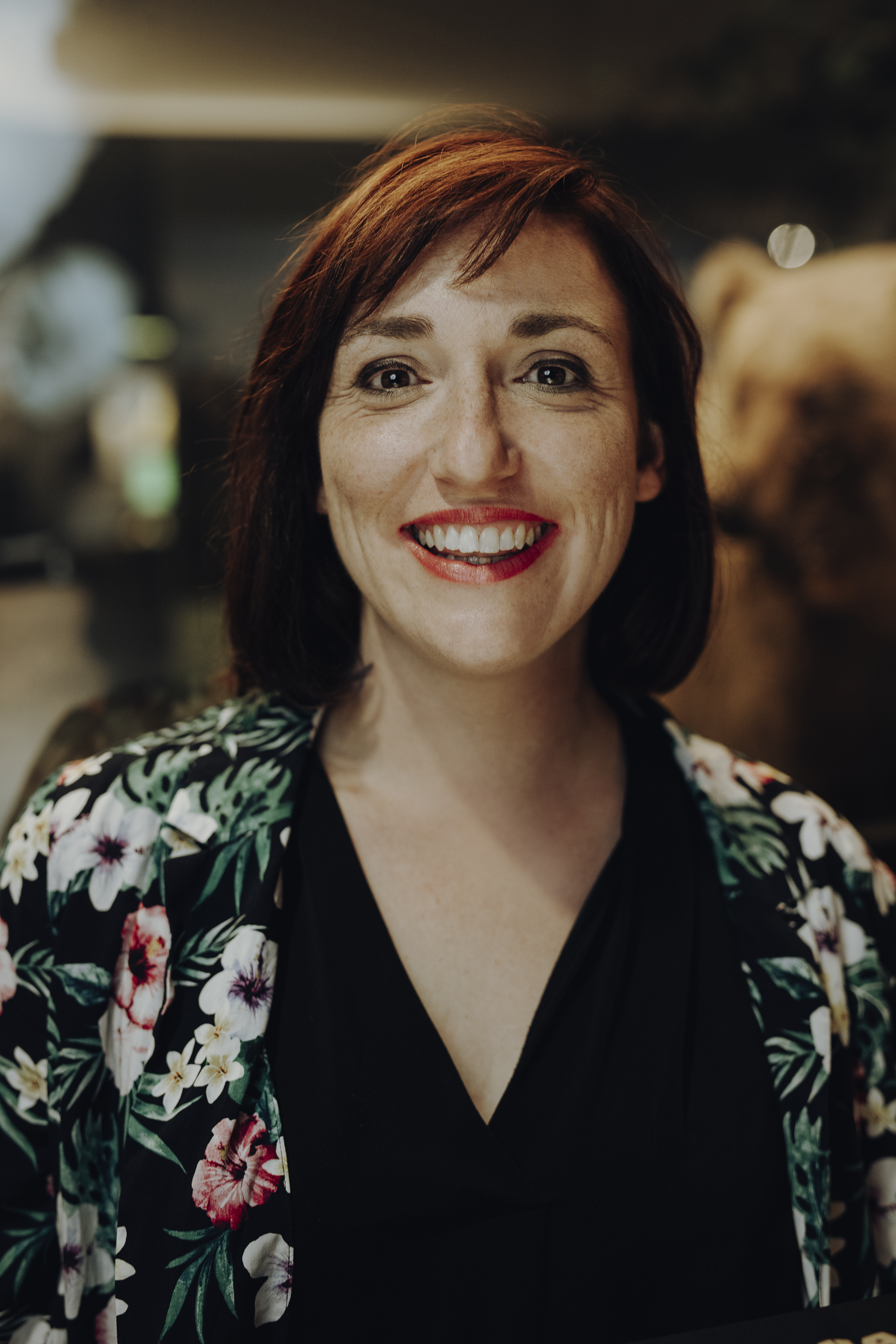 Christl Sittenauer, Improschauspielerin aus München Foto 2019 by Isenhoffs büro